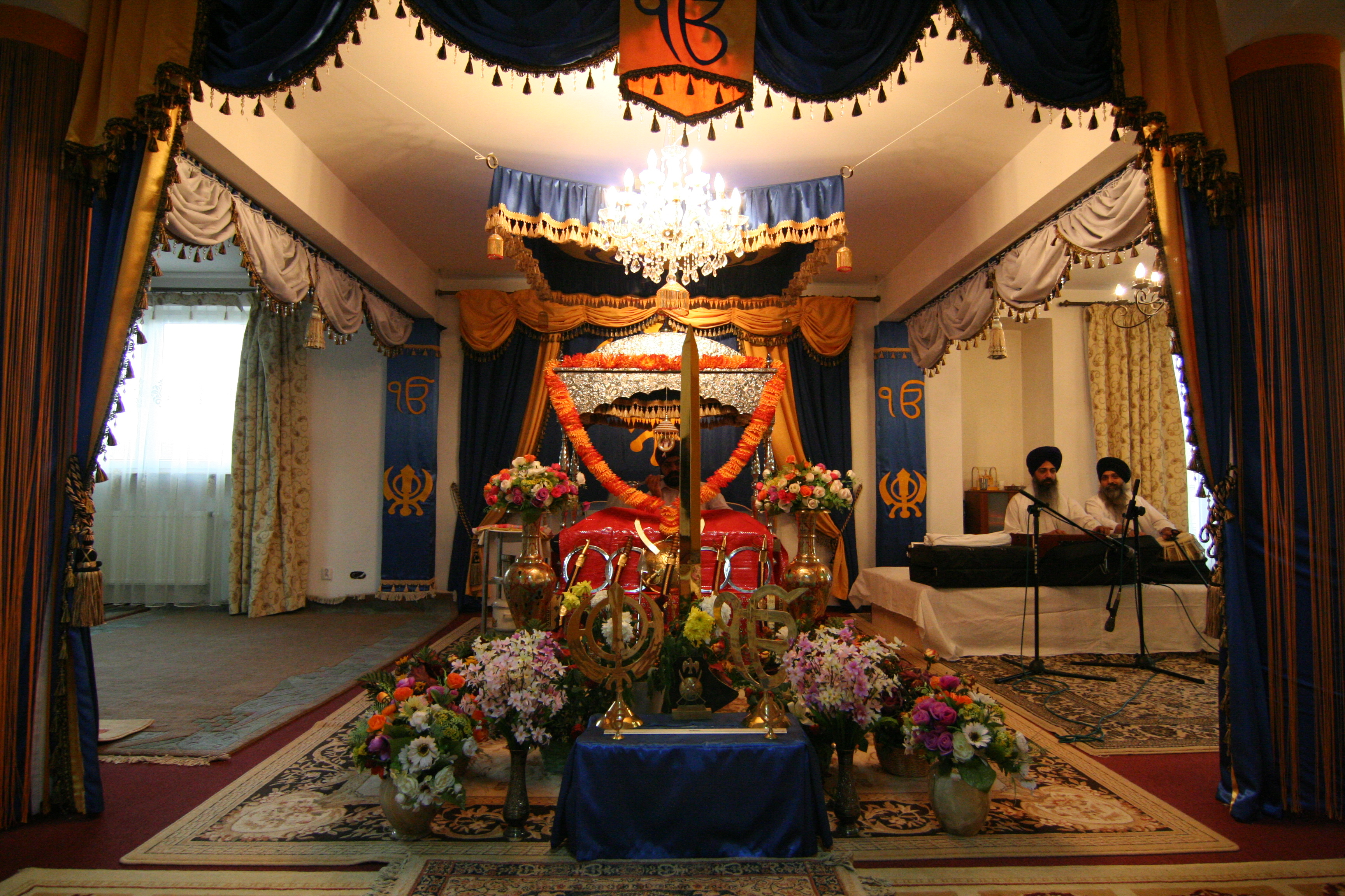 Singh Saba Gurudwara in Poland